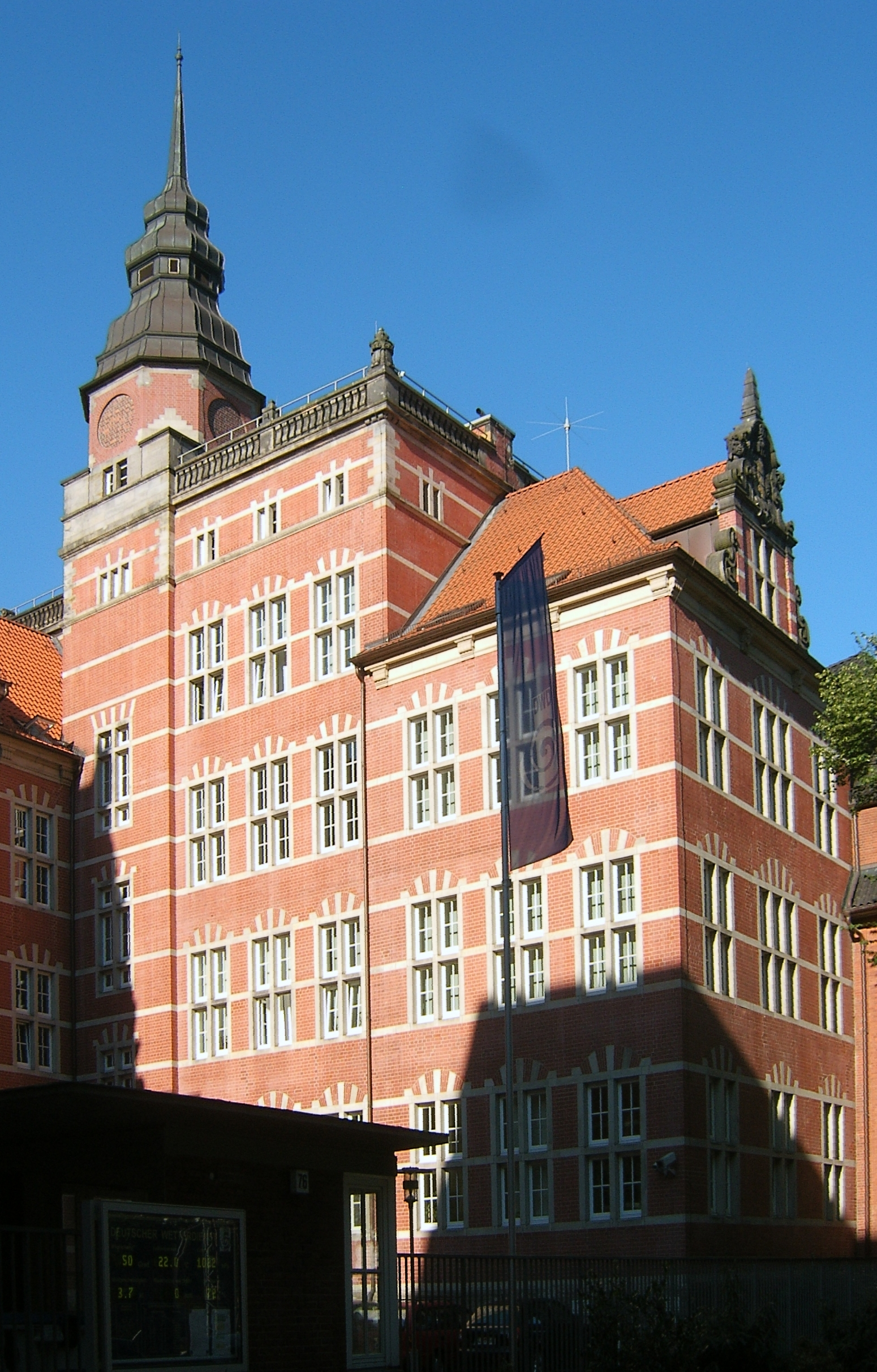 Bildbeschreibung: Hamburg, St. Pauli, Deutscher Wetterdienst (DWD) Fotograf: selbst Datum: 19.07.2006